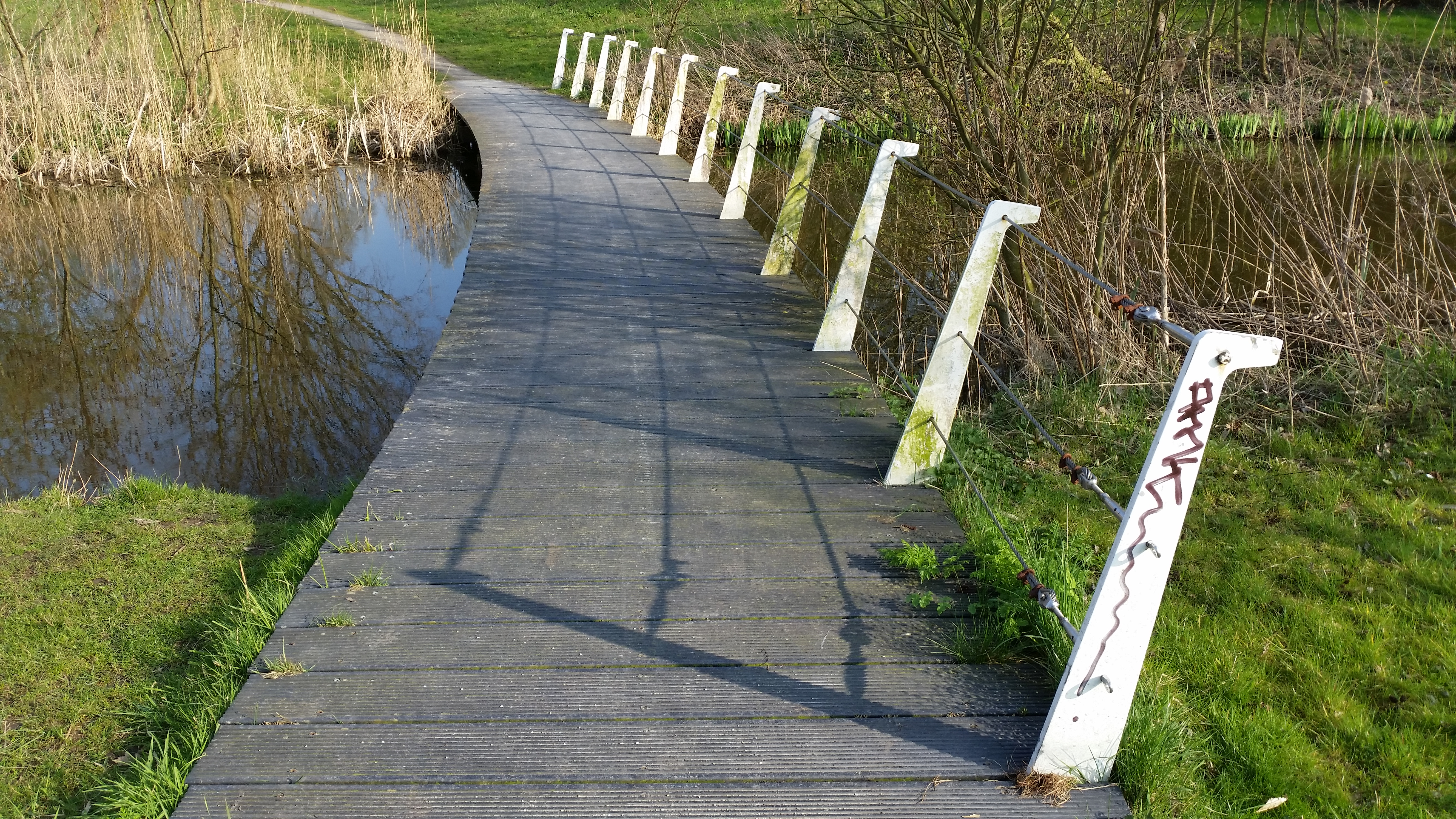 Brug 2382 (in Amsterdam)